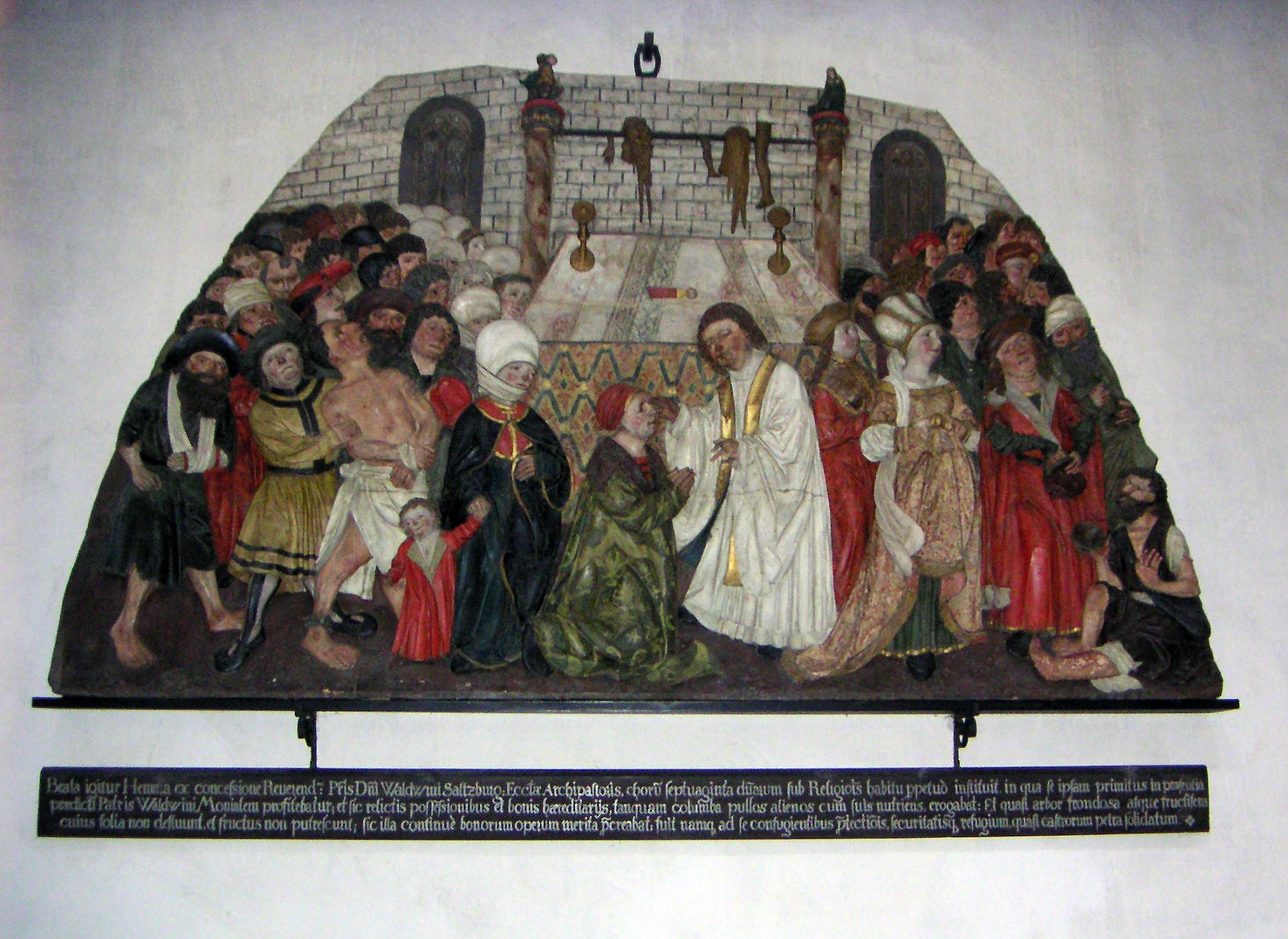 Eines der zahlreichen Holzreliefs im Gurker Dom in Kärnten, die das leben und Wirken der Heiligen Hemma von Gurk illustrieren - aus dem Jahr 1428